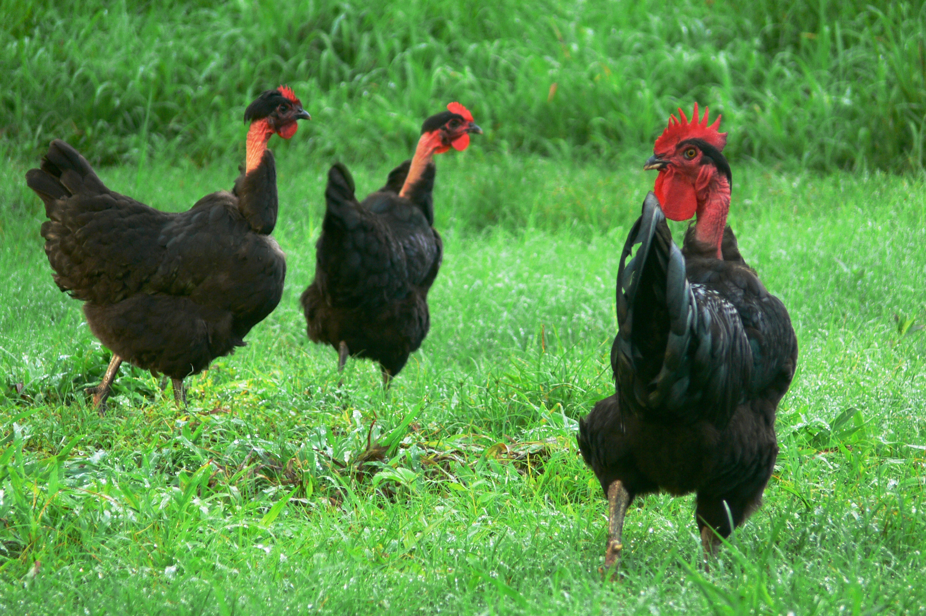 Trío Pirocón Negro en pastoreo